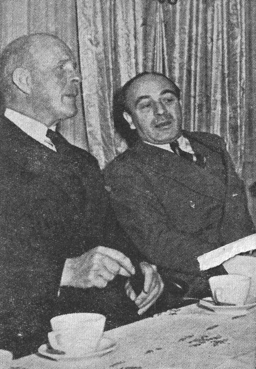 גרשון אגרון (מימין) במפגש עיתונאים במלון עדן בירושלים עם הנציב העליון לורד גורט.